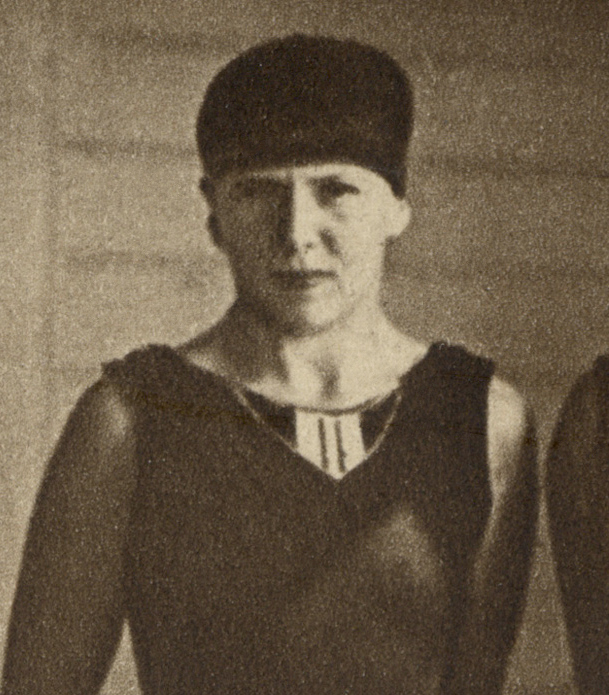 Selma Andersson